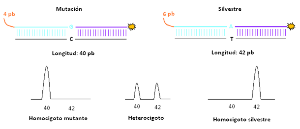 Ejemplo de interpretación de resultados obtenidos mediante electroforesis capilar tras utilizar la técnica OLA